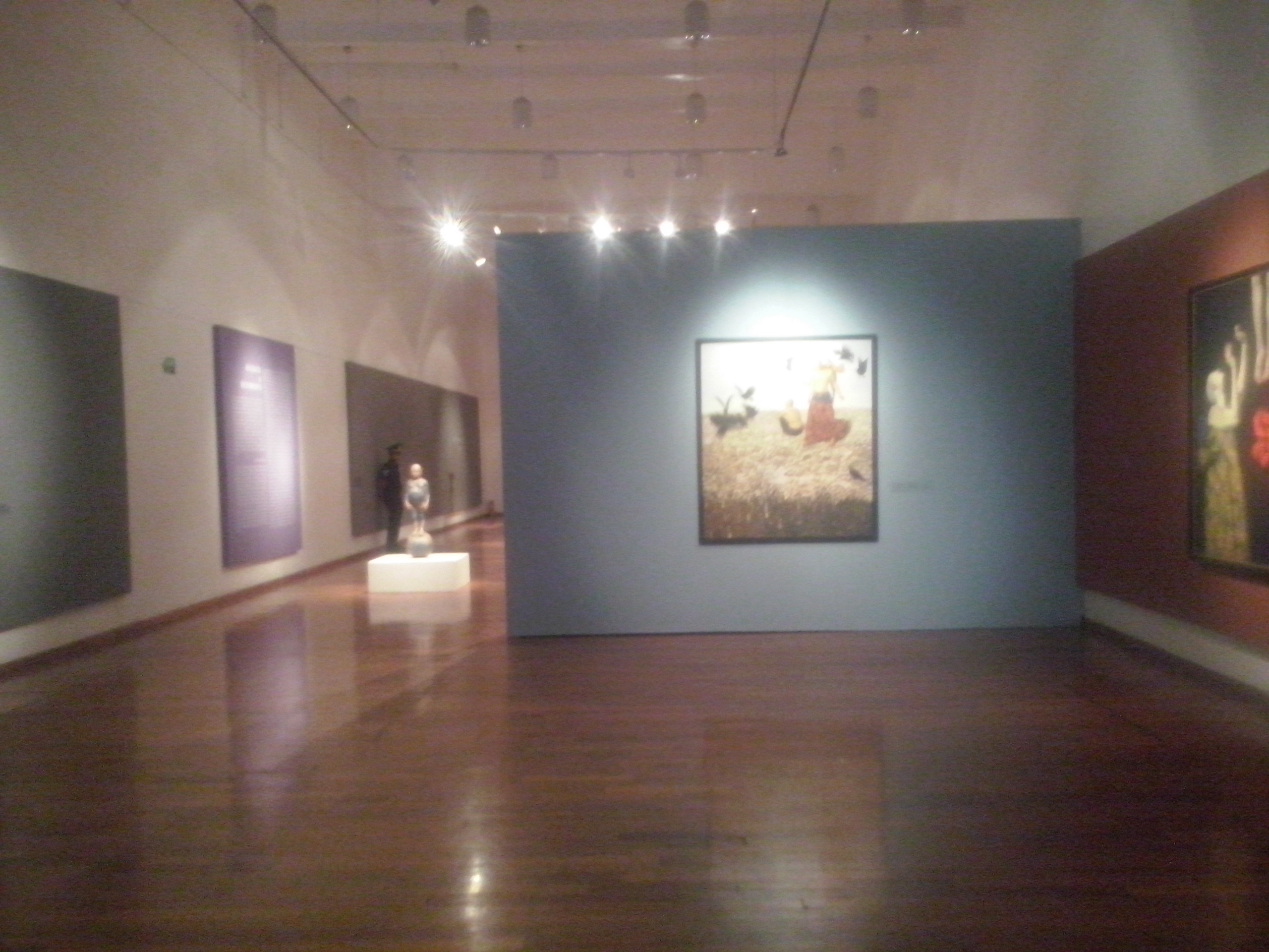 Cuartel del Arte en Pachuca, Hidalgo